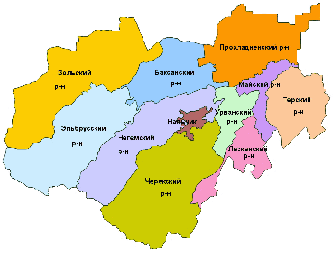 Адм. карта Кабардино-Балкарии